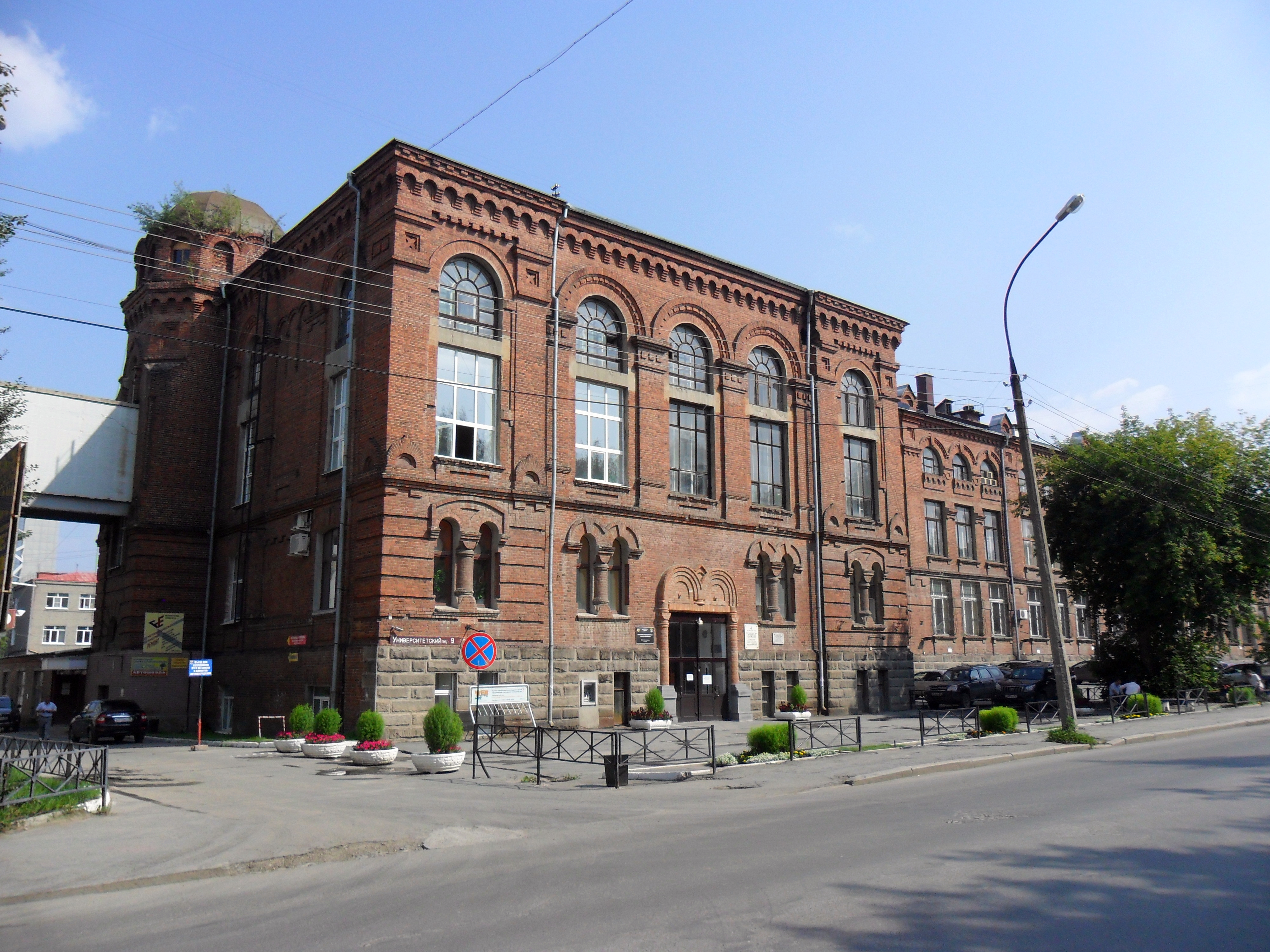 Второе учебное здание УГГУ. В нем располагаются горно-технологический факультет, факультет гражданской защиты, профсоюзный комитет (первичная организация) и несколько кафедр других факультетов. До 1919 года здесь находилось женское епархиальное училище и Церковь Екатерины при училище.